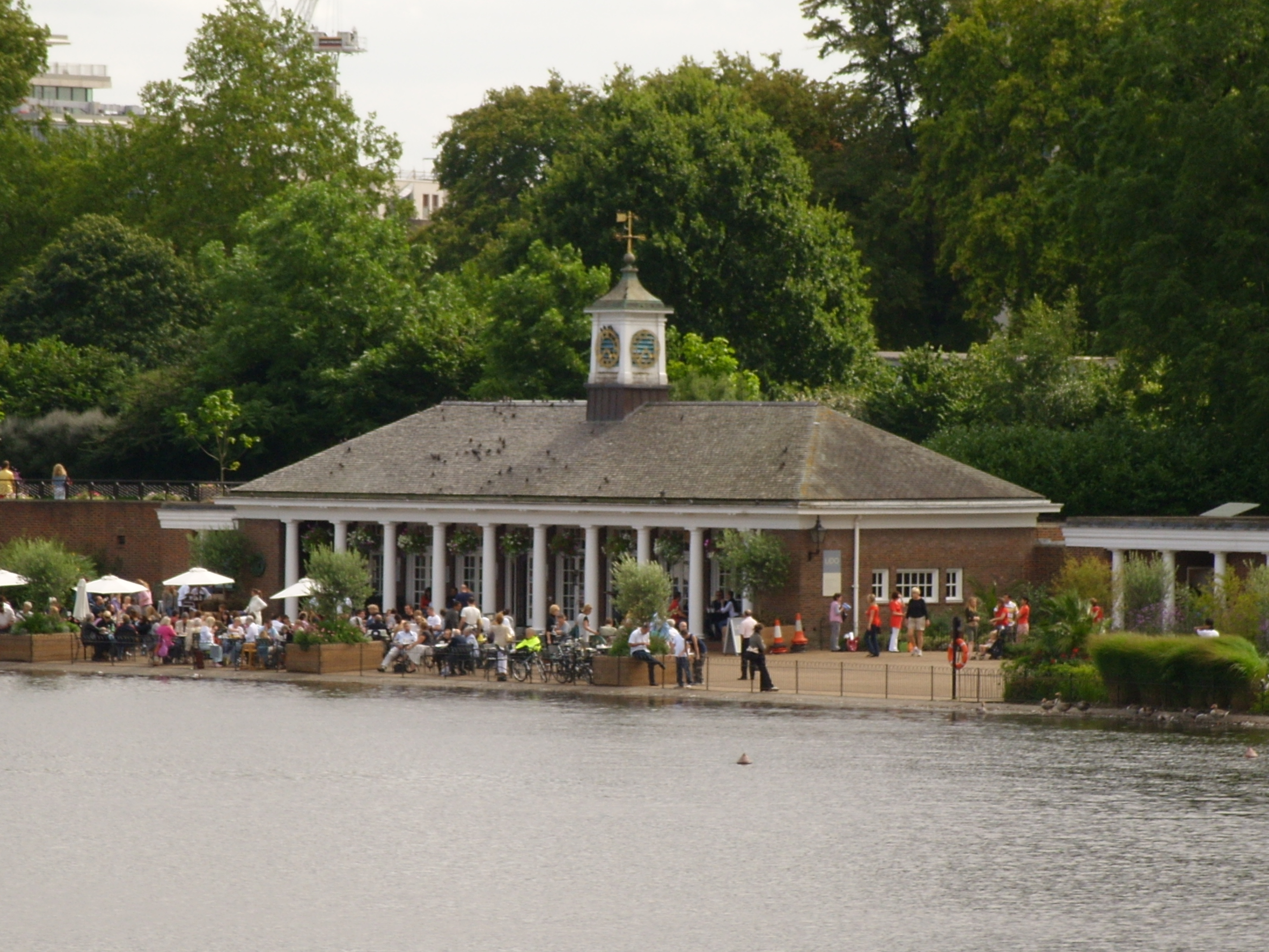 Lansbury's Lido, Hyde Park, London